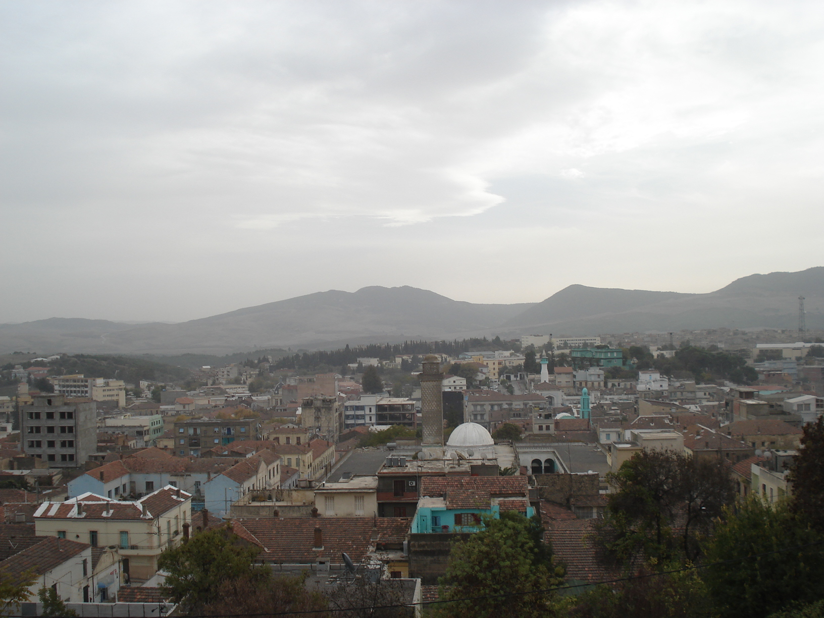 وسط مدينة سوق أهراس.